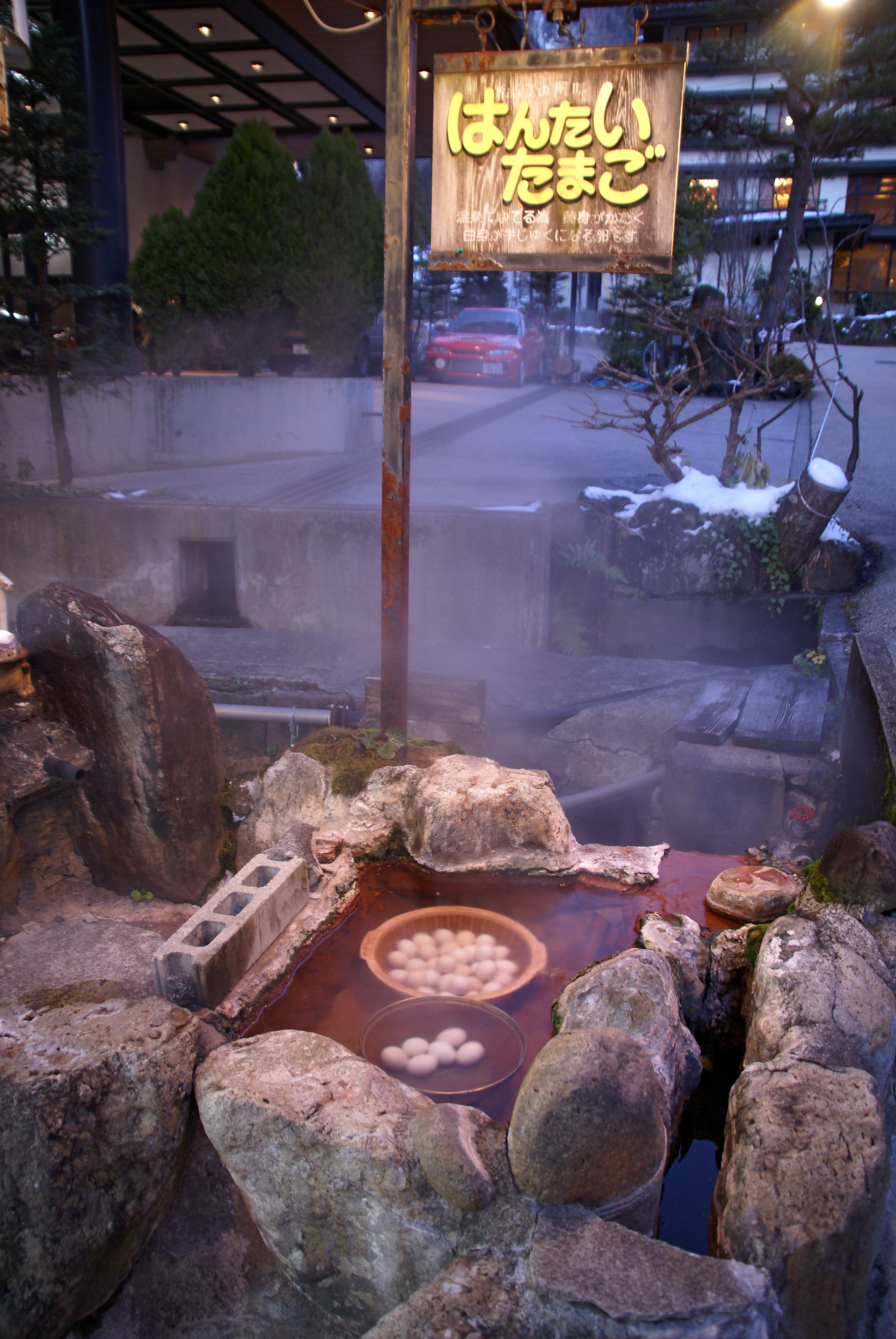 Hirayu Onsen in Takayama, Gifu prefecture, Japan